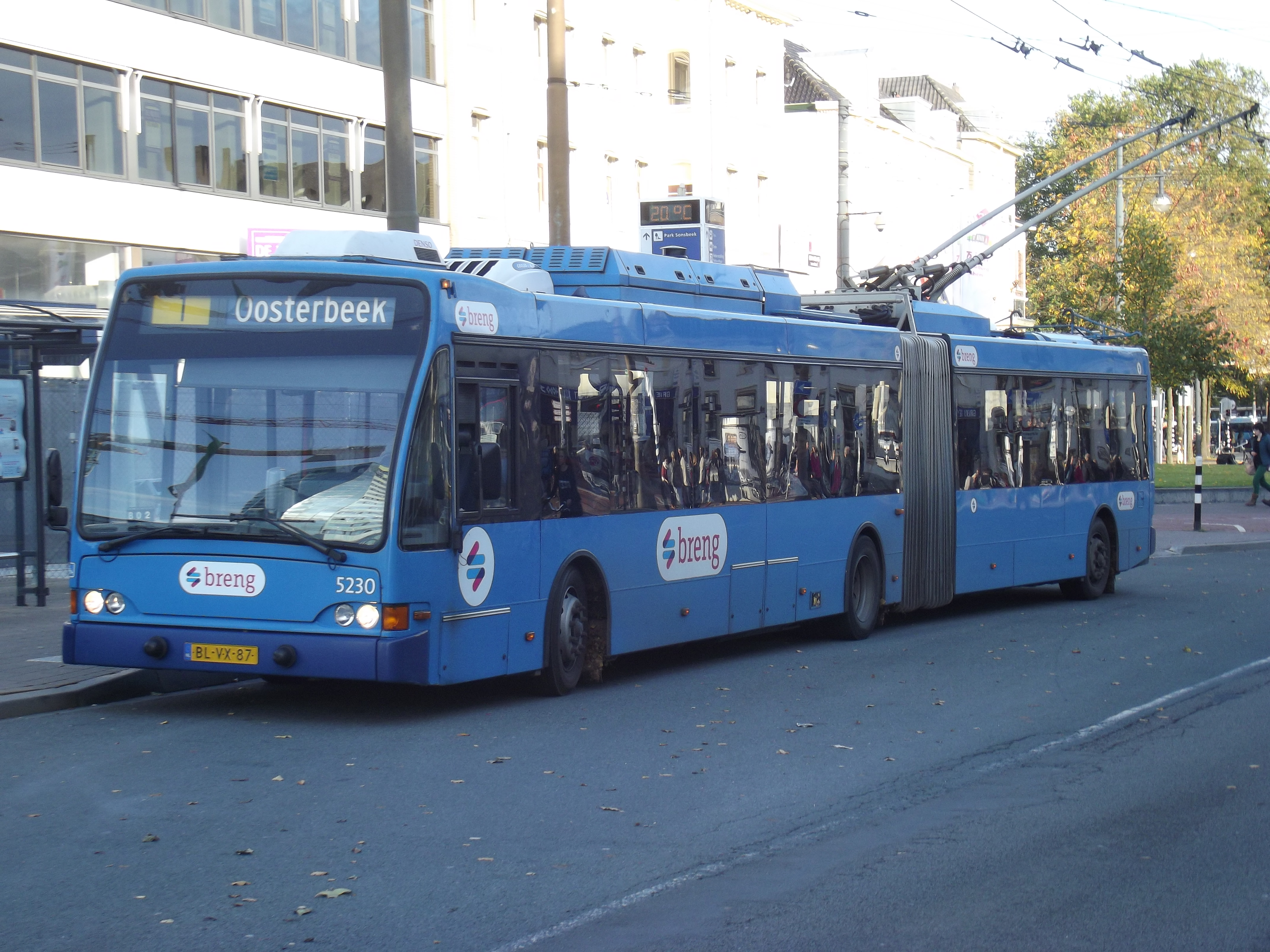 Halte trolleybuslijn 1 voor het station. In de richting Oosterbeek rijdt hij niet in het busstation, wel in de andere richting.